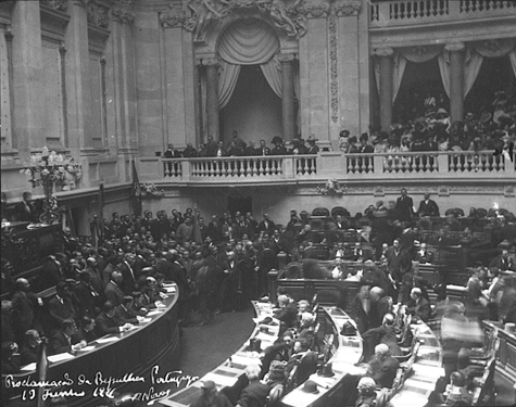 Proclamação da República Portuguesa no hemiciclo do Palácio de São Bento (Assembleia da República), em Lisboa